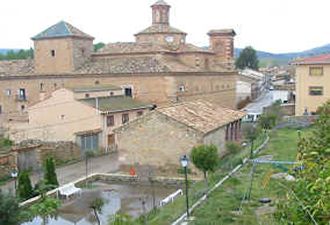 Gea de Albarracín (antiguo cuartel)